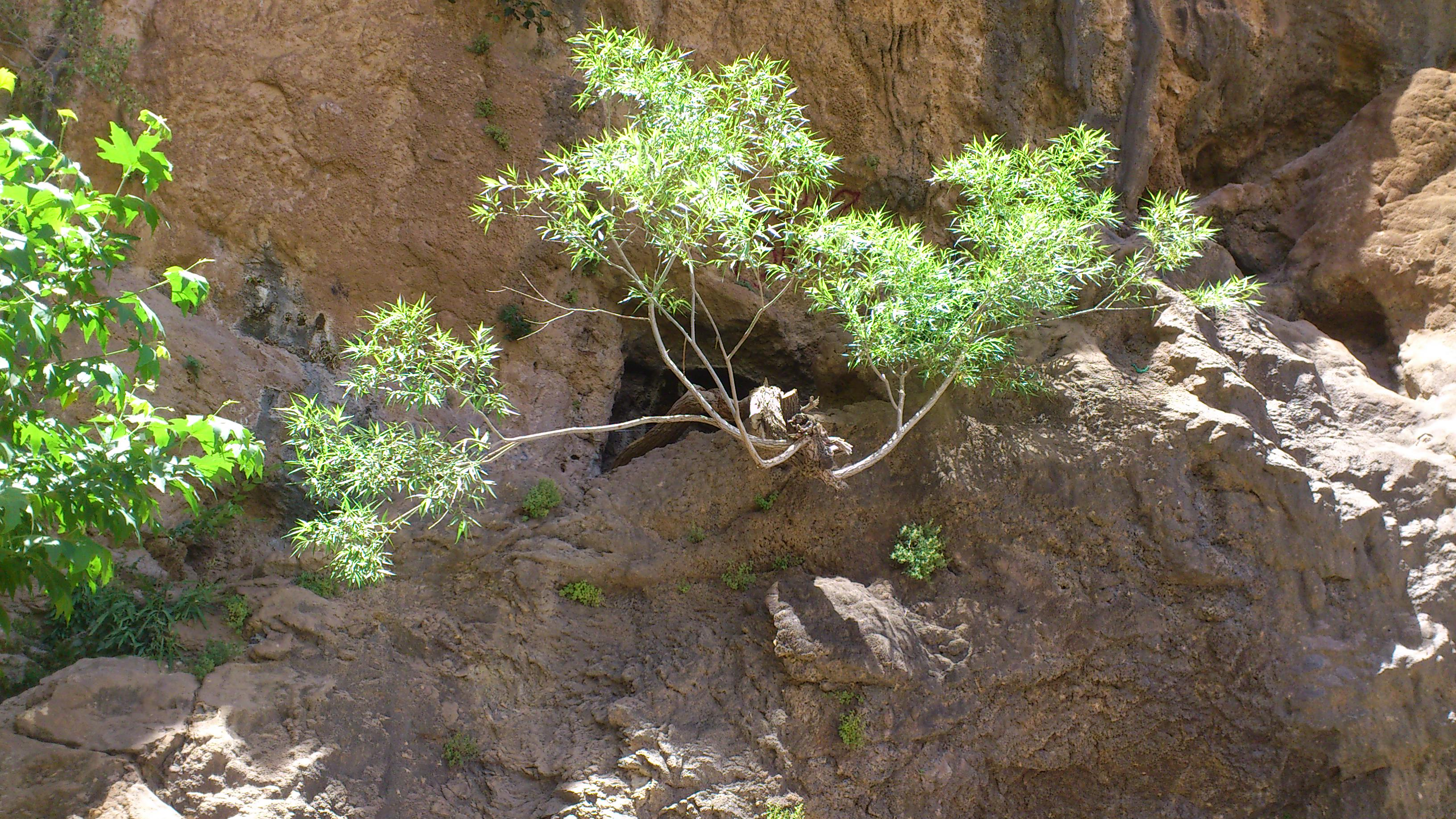 شاه لولاک